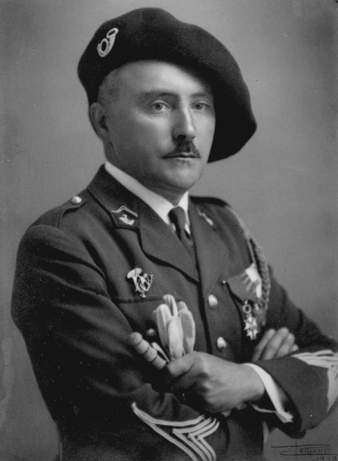 Commandant Soutiras, chef de corps du 7e BCA.